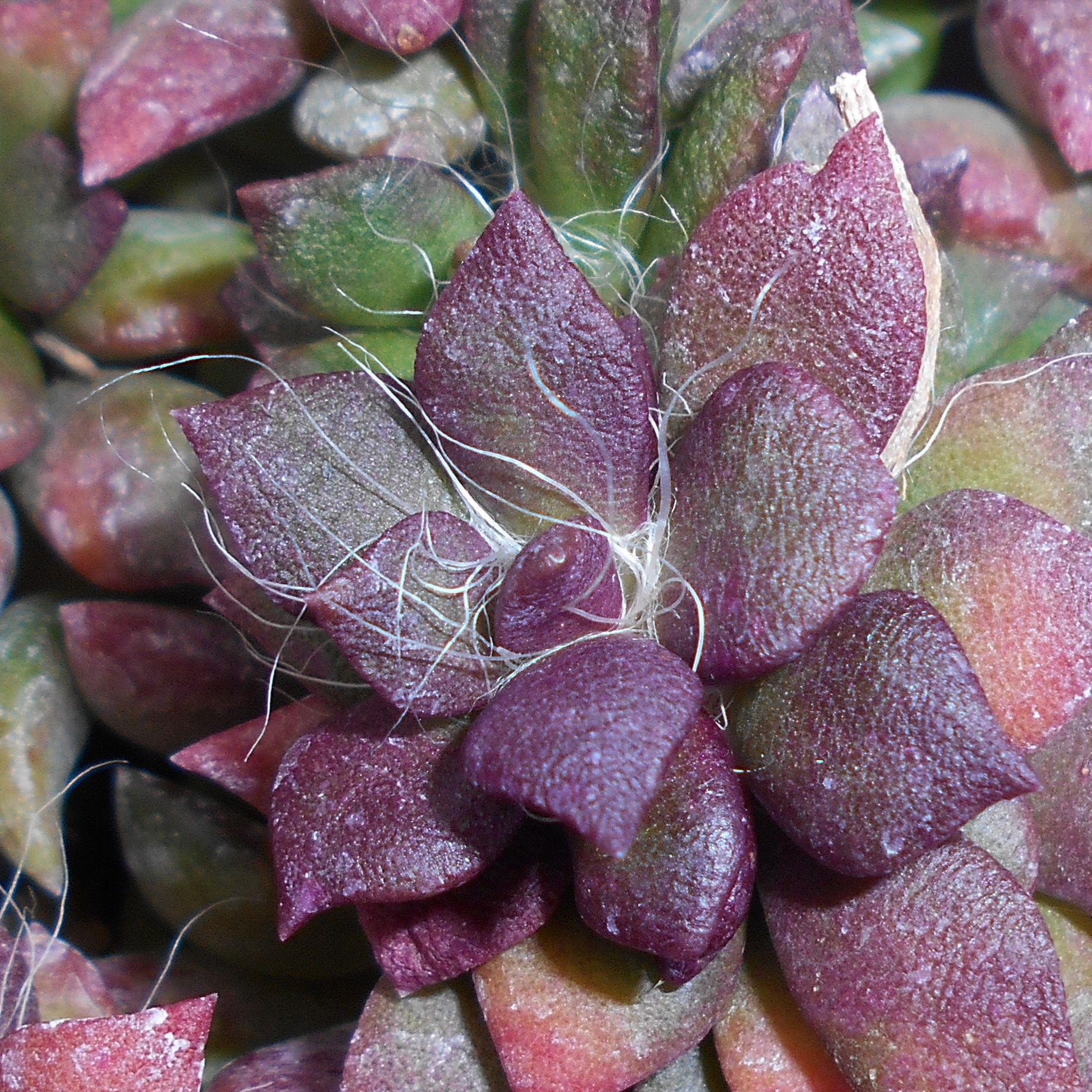 Anacampseros telephiastrum, Ogród Botaniczny Uniwersytetu Wrocławskiego.